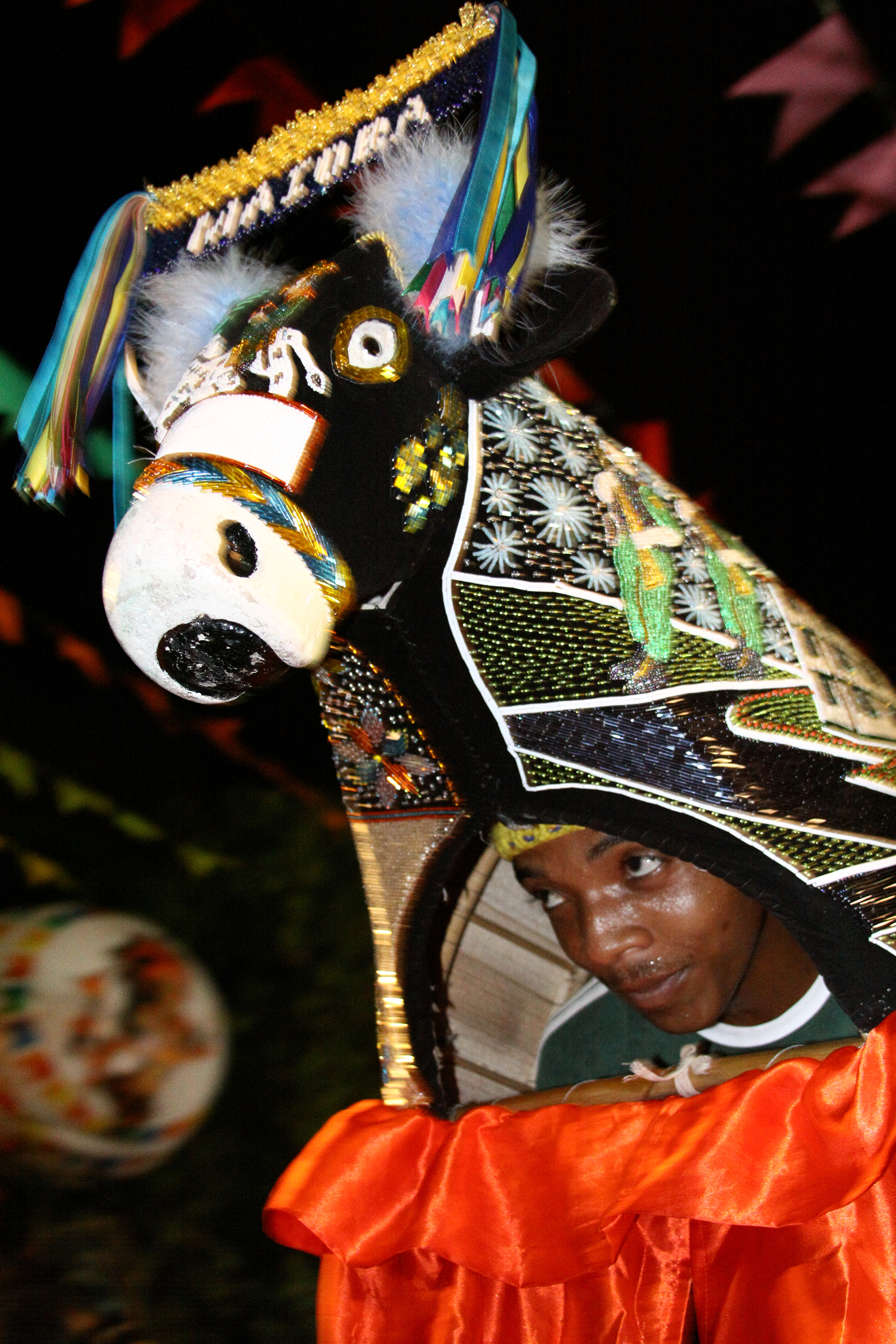 fotografando o bumba meu boi, tive a sorte de pegar esse miolo bem feliz e fazendo seu trabalho com fervor...